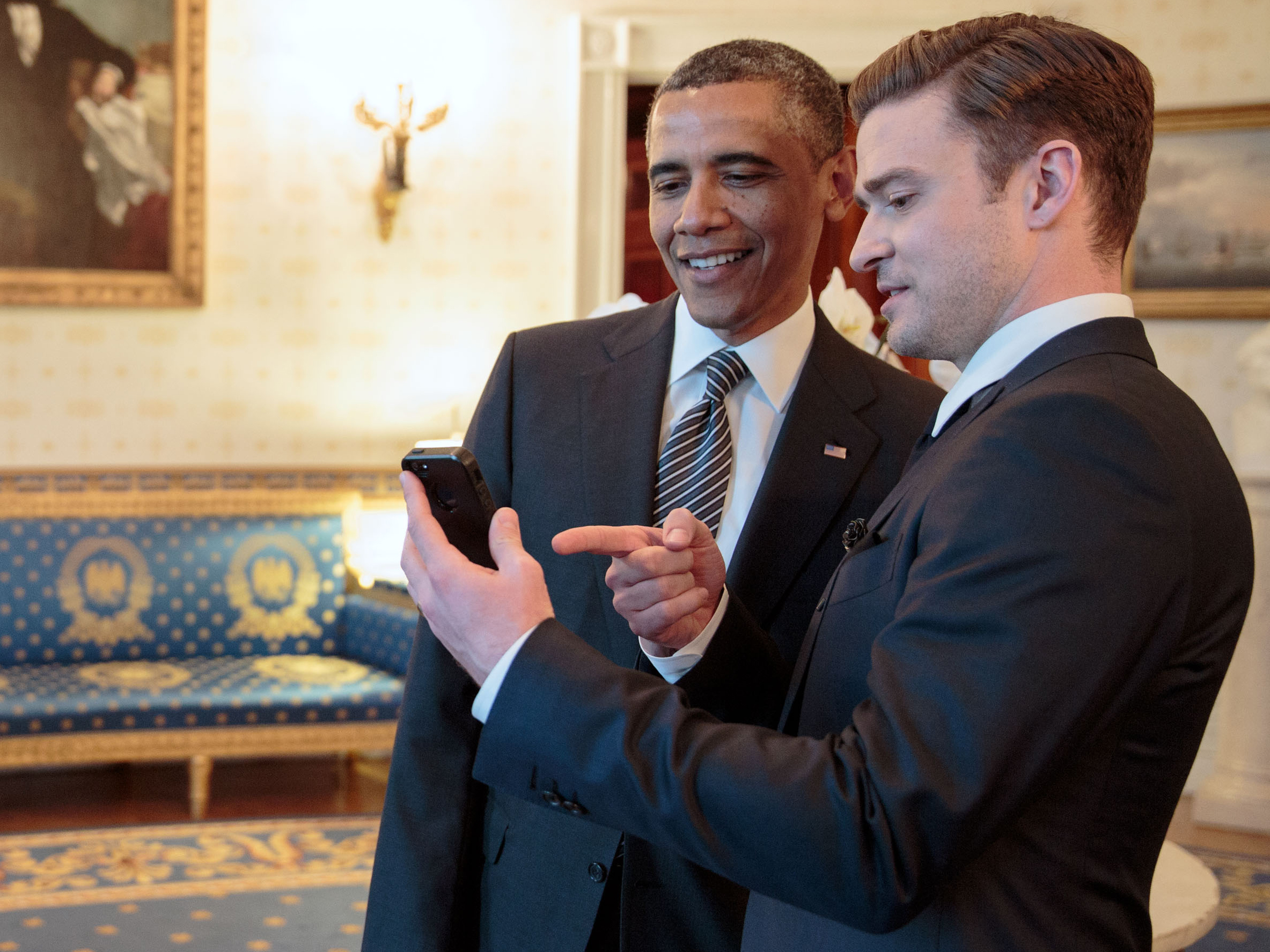 El cantante Justin Timberlake y el presidente de los Estados Unidos, Barack Obama, reunidos en el Salón Azul de la Casa Blanca antes del concierto In Performance at the White House: Memphis Soul.